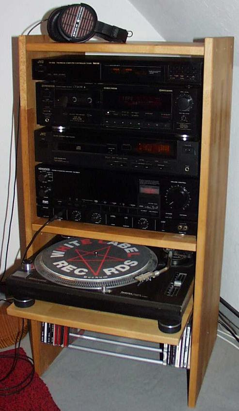 Hifi-Rack mitausziehbarem Boden und CD-Ständer